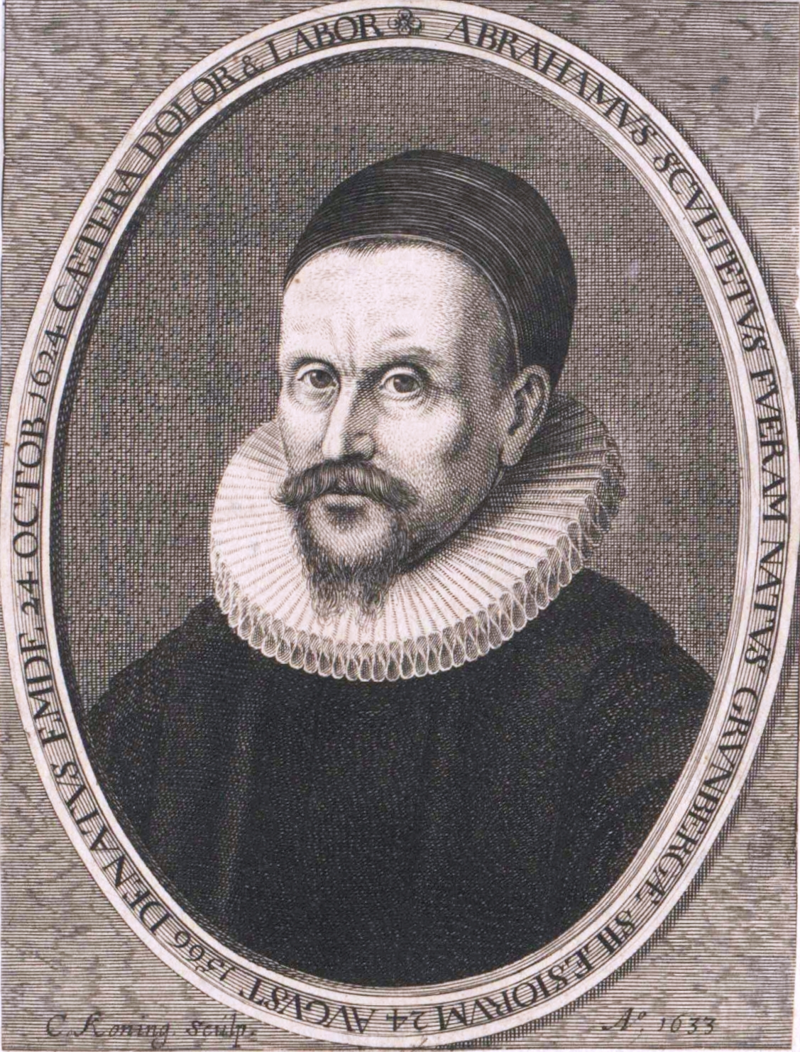 Abraham Scultetus (1566–1625)